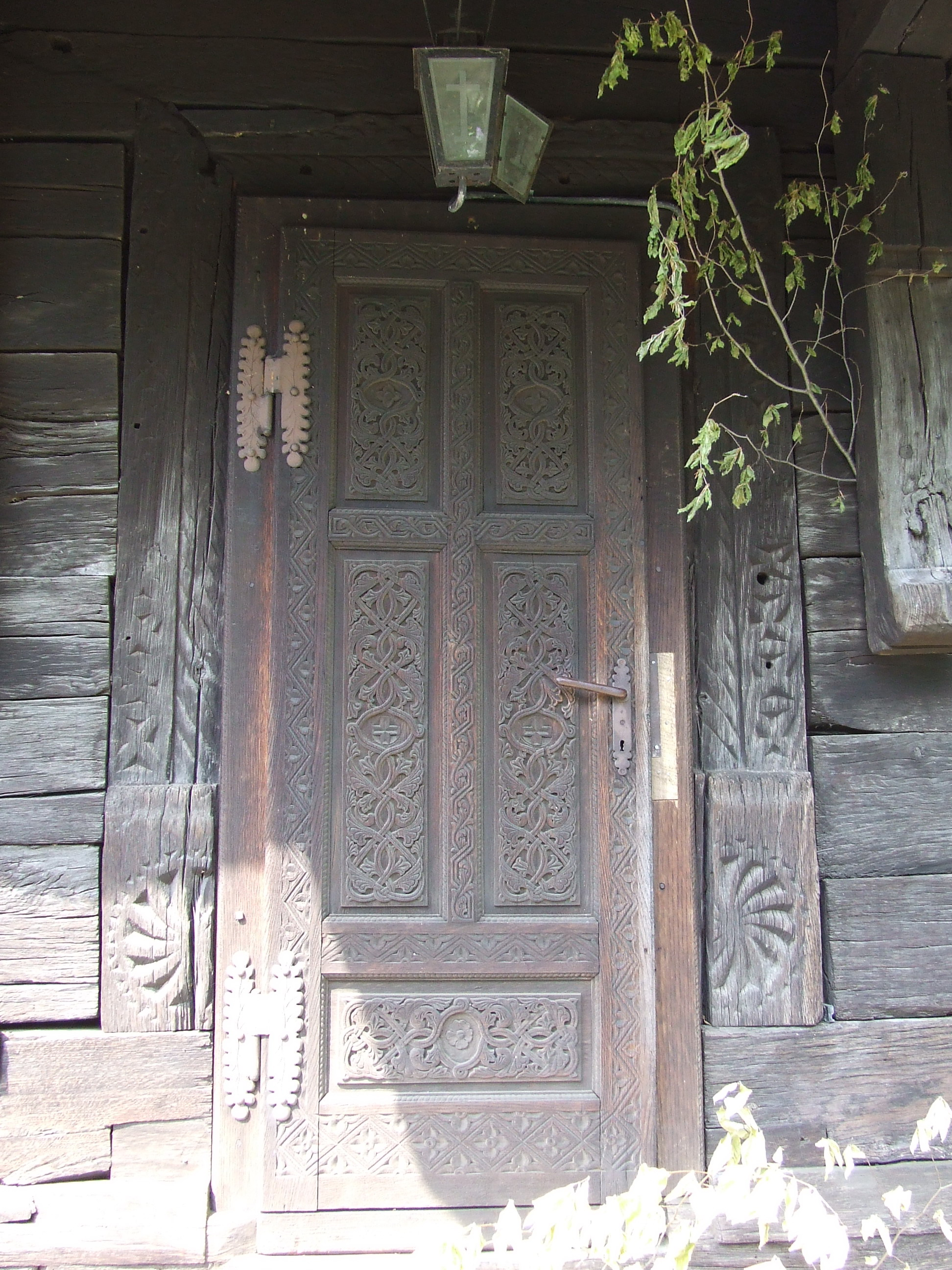 Biserica de lemn din Gâlgău. Intrarea. Autor: Bogdan Ilieş Data: mai 2007